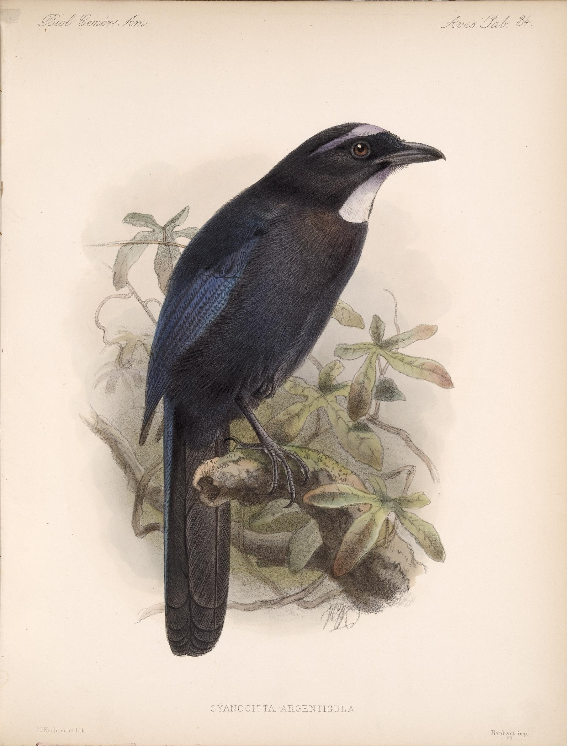 ^f^r- ^/zy. \ I k I y % -I Ir /' CYANOCITTA -ARGENTIGULA, J.G".Ke"uie2r!.axis litli. - 90 ^ •- J r r- 'h h - ' . . ■■■■ .' -i^ ' ' ,-A. ■■ A 'f ■ I- bh l r ■ -"J r . ' i■ if : ; l ' ^r ^